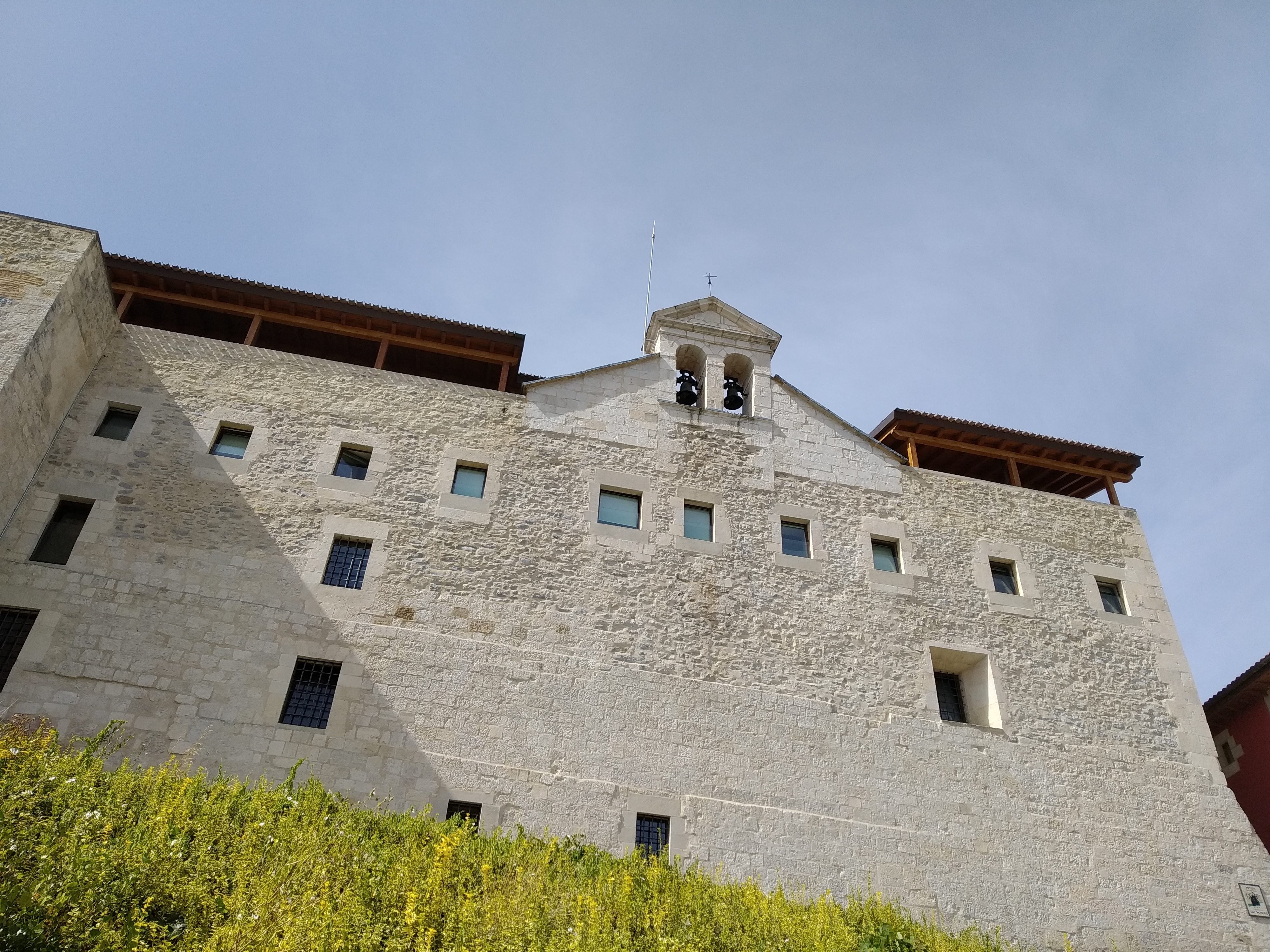 Agurain